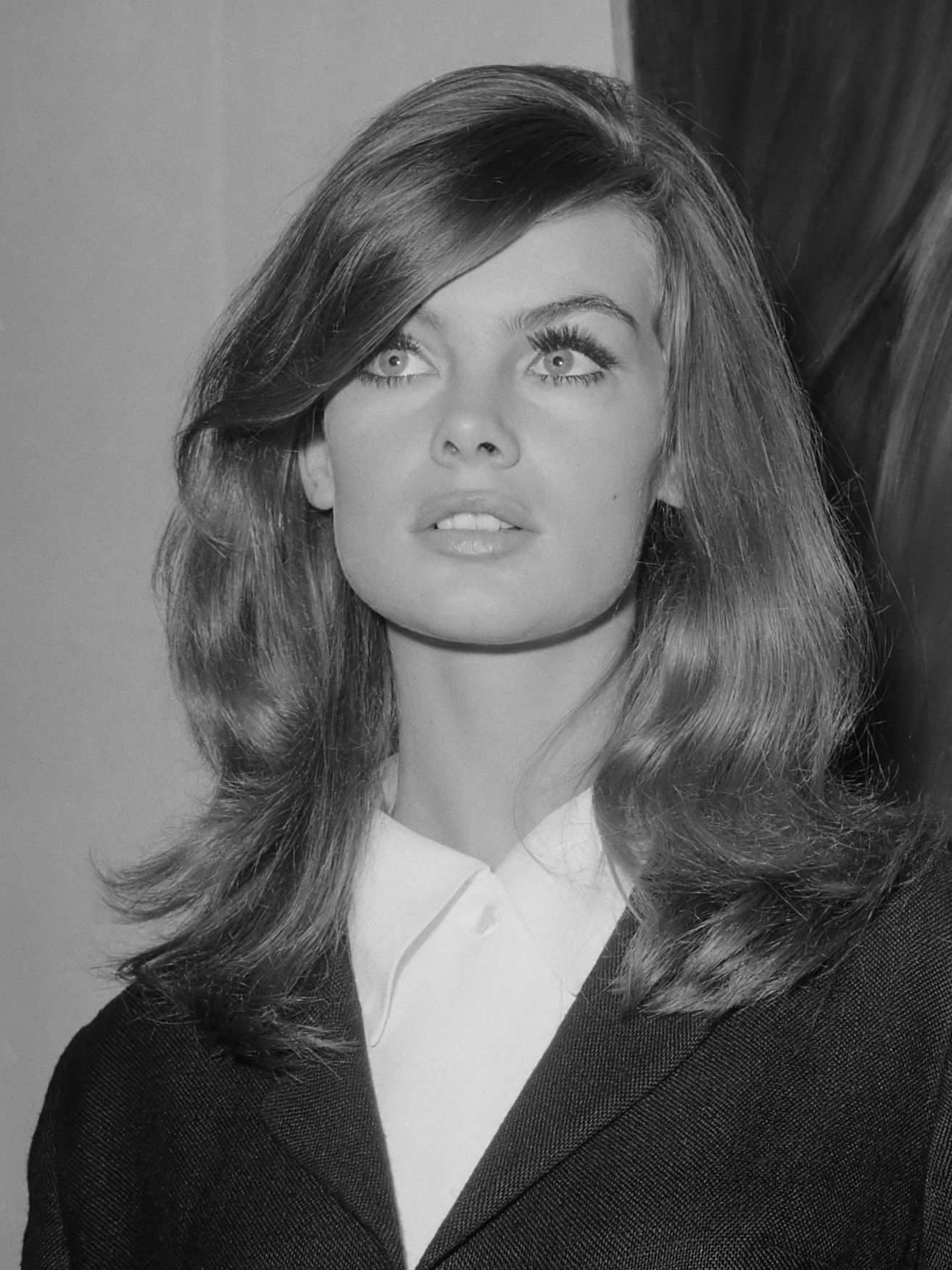 Jean Shrimpton (fotomodel) tentoonstelling geopend in Galerie Krikhaar te Amsterdam 17 september 1965